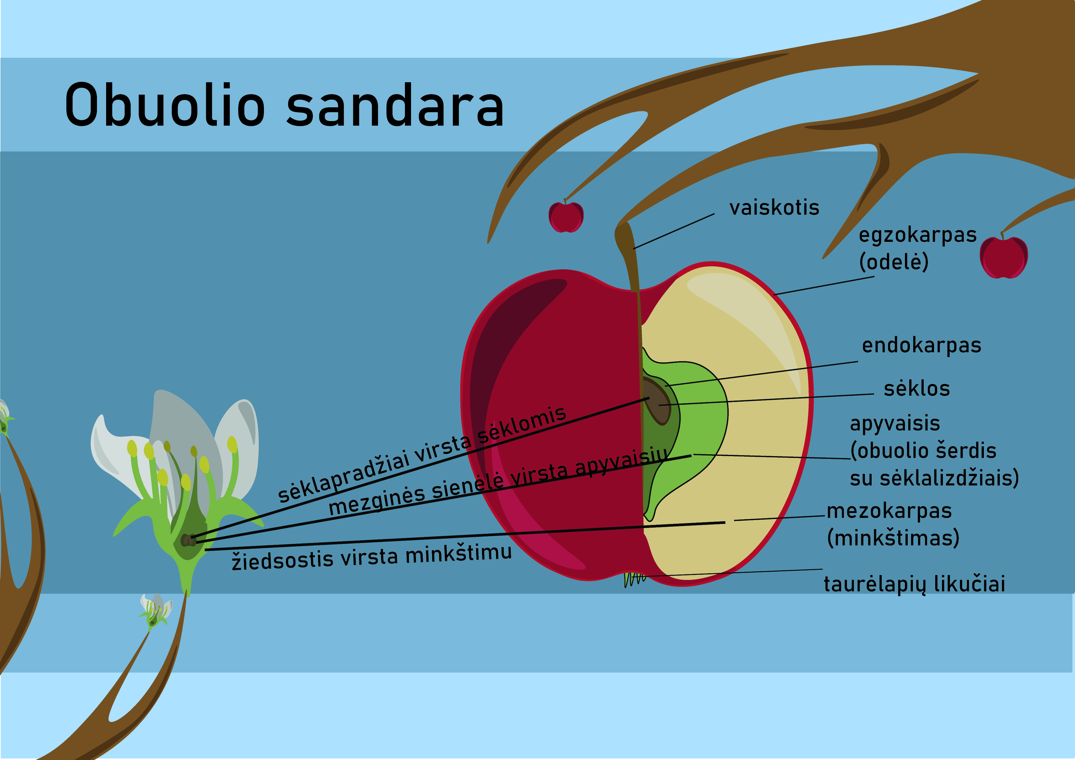 Obuolio sandara